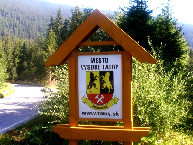 Osada Podbanské, Slovakia